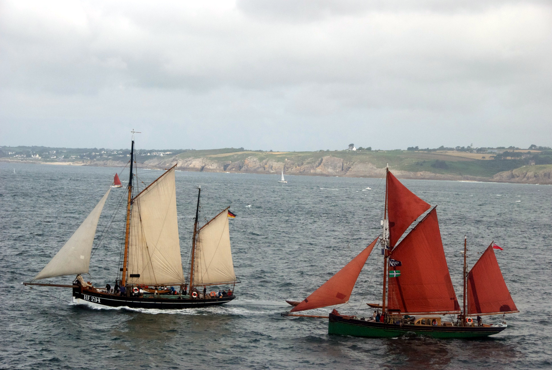 Tonnerres de Brest 2012 Armada Brest - Douarnenez (Praesident Freiherr von Maltzahn et Provident )